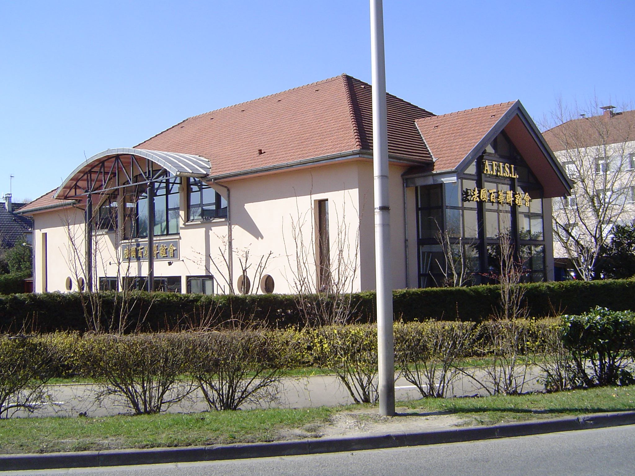 Photos prises à Lognes, commune française de Seine-et-Marne